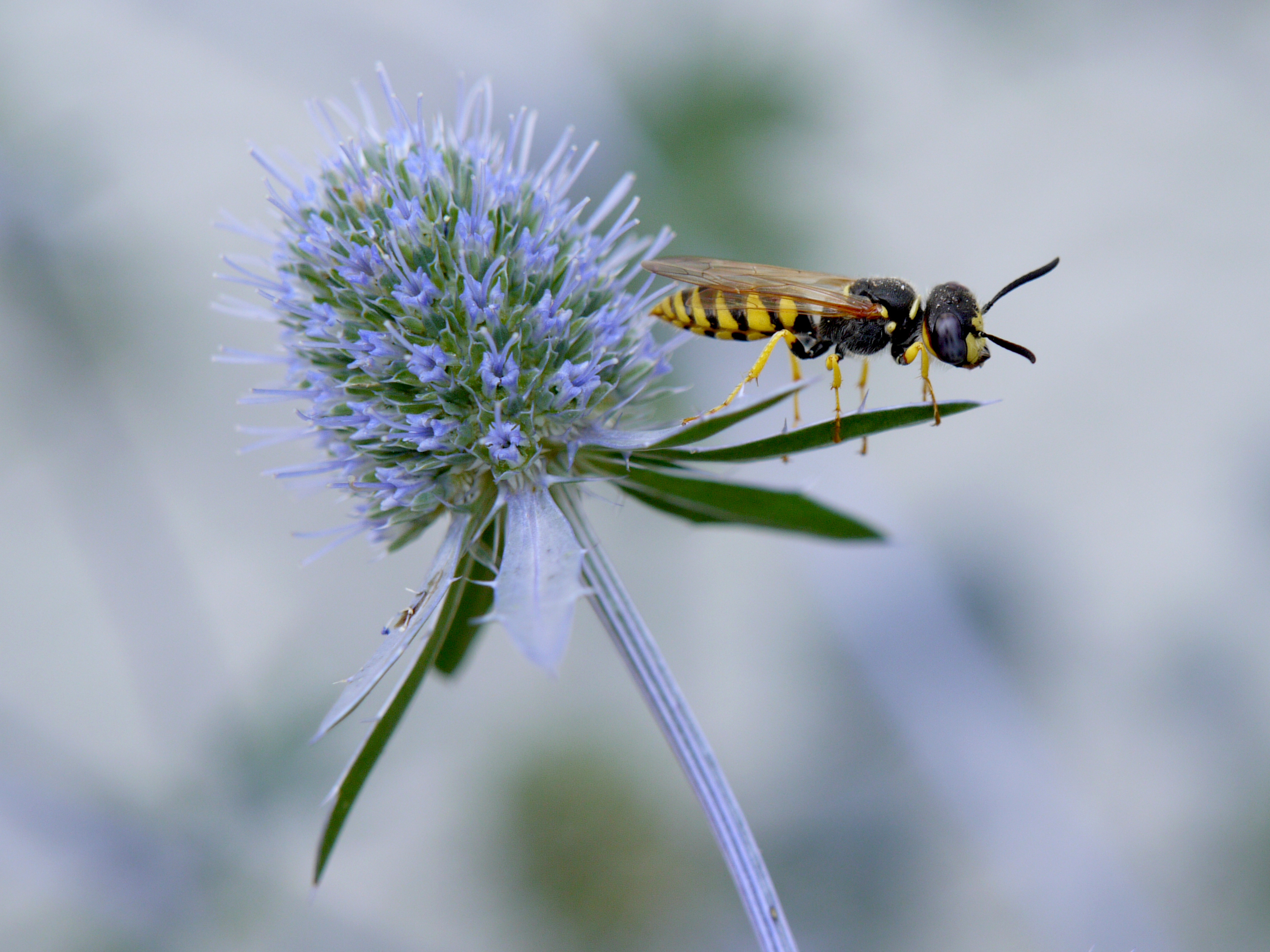 Bienenwolf Philanthus triangulum, Männchen, auf Mannstreu. Fundort: Ein Stadtgarten in der Metropolregion Nürnberg